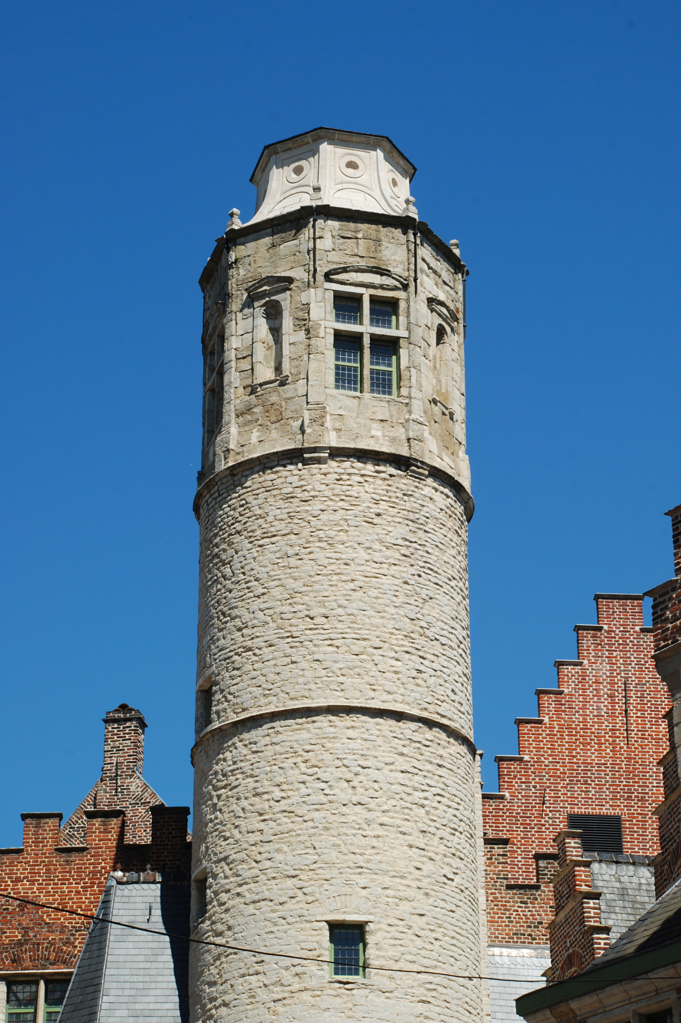 Belgique - Gand - Maison de l'Arrière-Faucille (14e-15e-16e siècles)